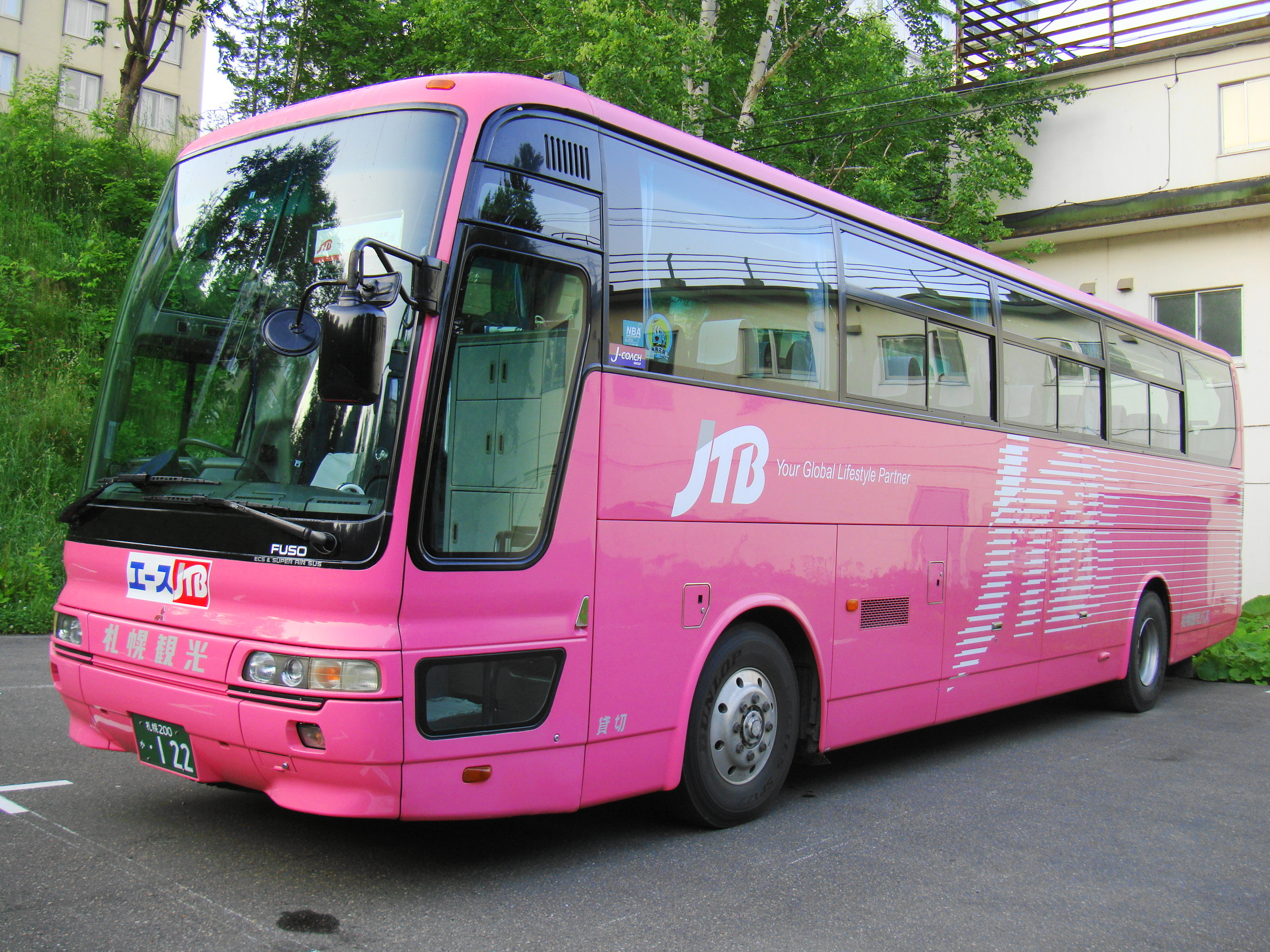 JTB